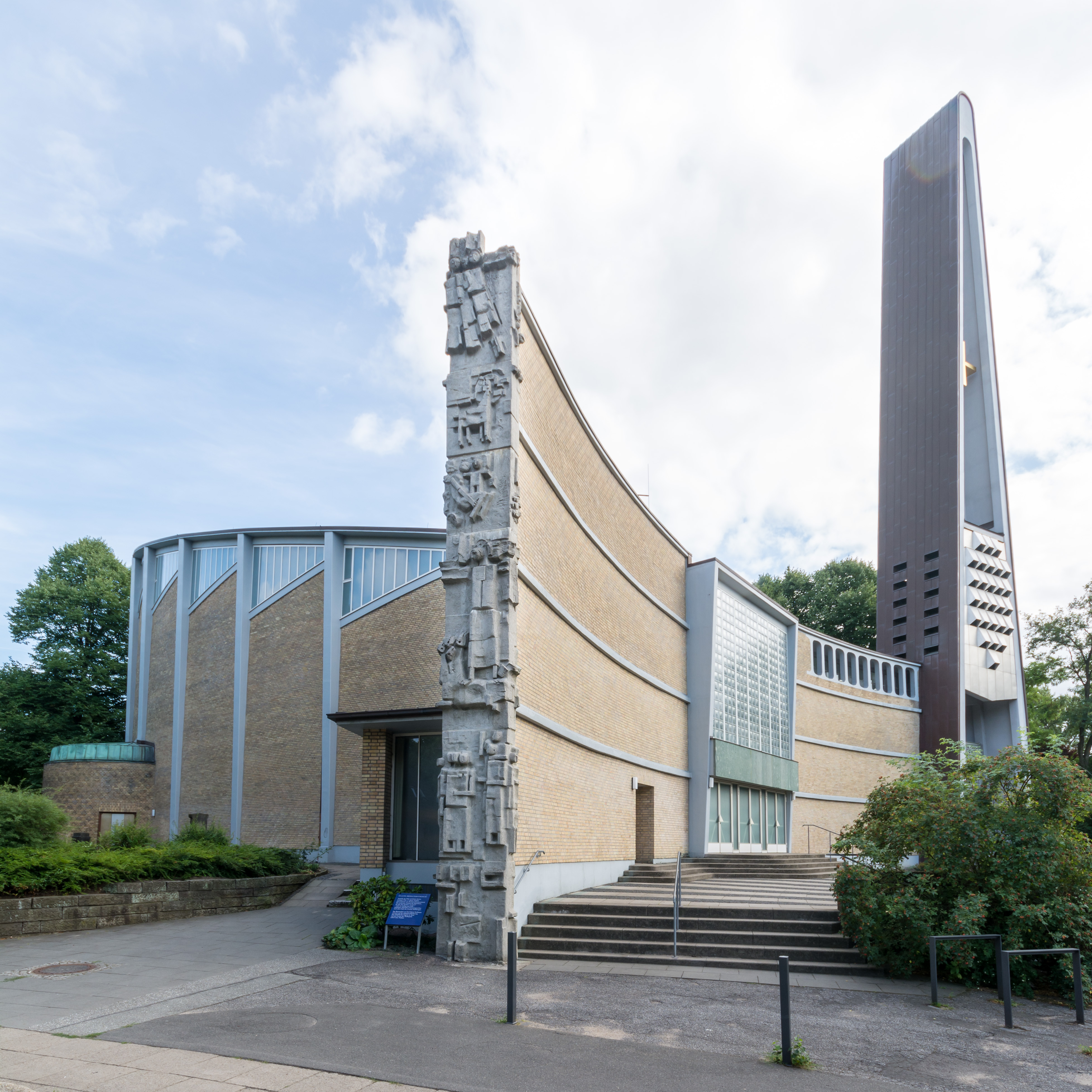 Ev.-luth. Dreifaltigkeitskirche in Hamburg-Hamm. This is a photograph of an architectural monument.